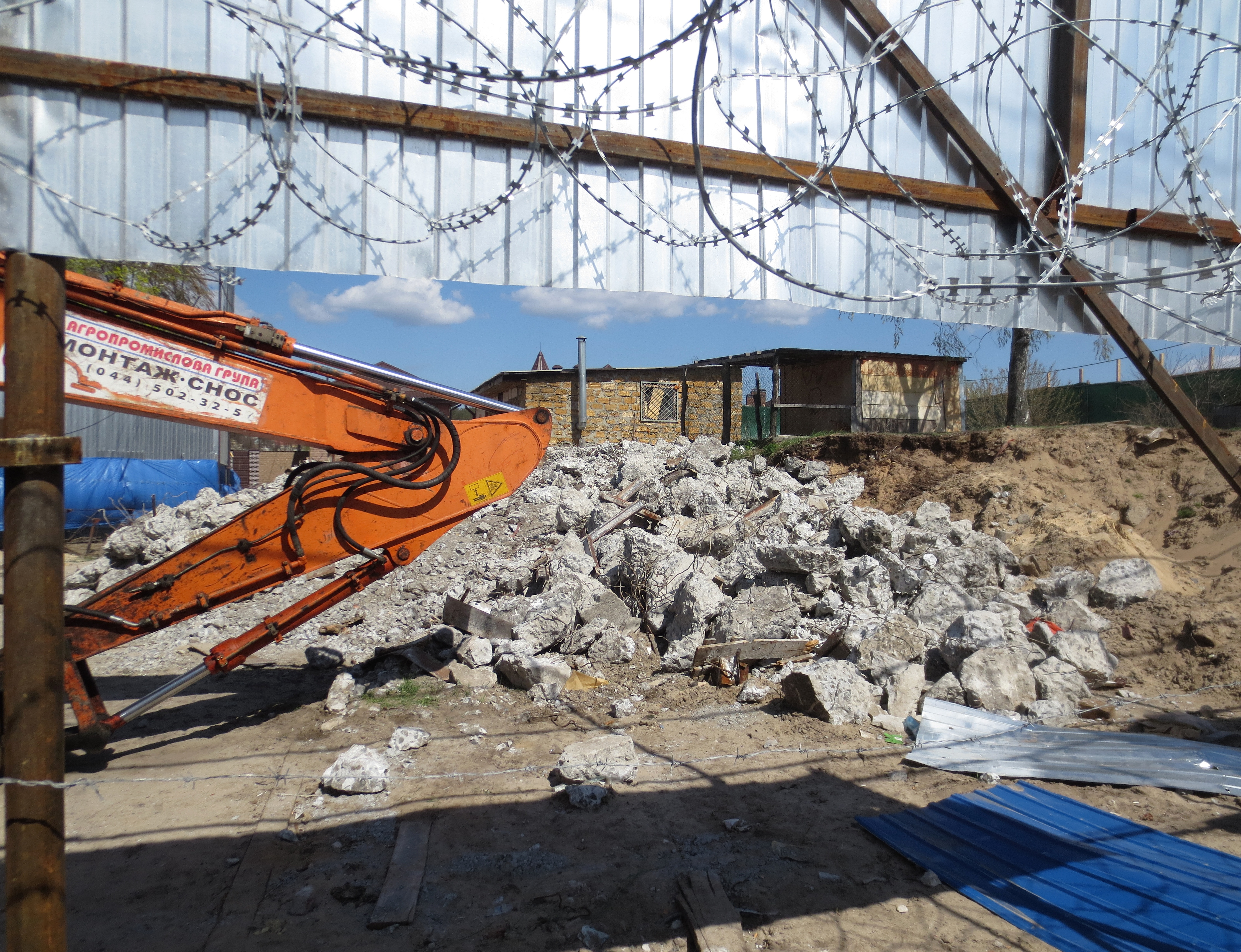 Все, що залишилося від дота. Зруйнований 2018 року. Знято 2018-04-18 13:52:33